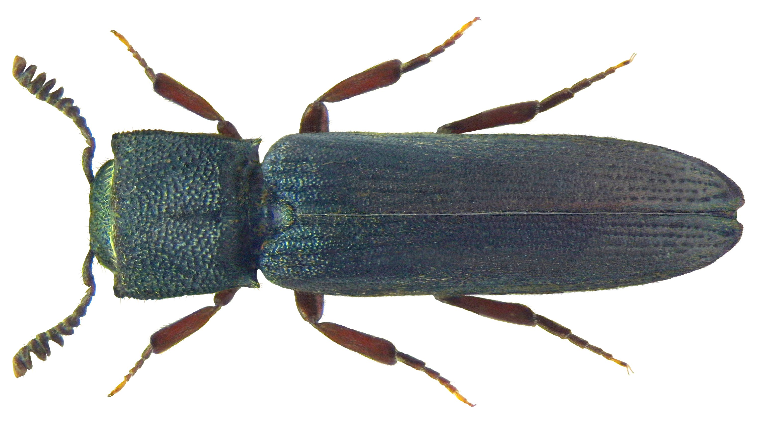 Familie: Eucnemidae Groesse: 8,0 mm Verbreitung: Palaearktis, verstreut und selten Oekologie: Entwicklung im toten Holz von Laubbäumen Fundort: Germania, Bayern, Mittelfranken, Ebenhausen, an Eiche leg.det. U.Schmidt, 1974 Photo: U.Schmidt, 2011